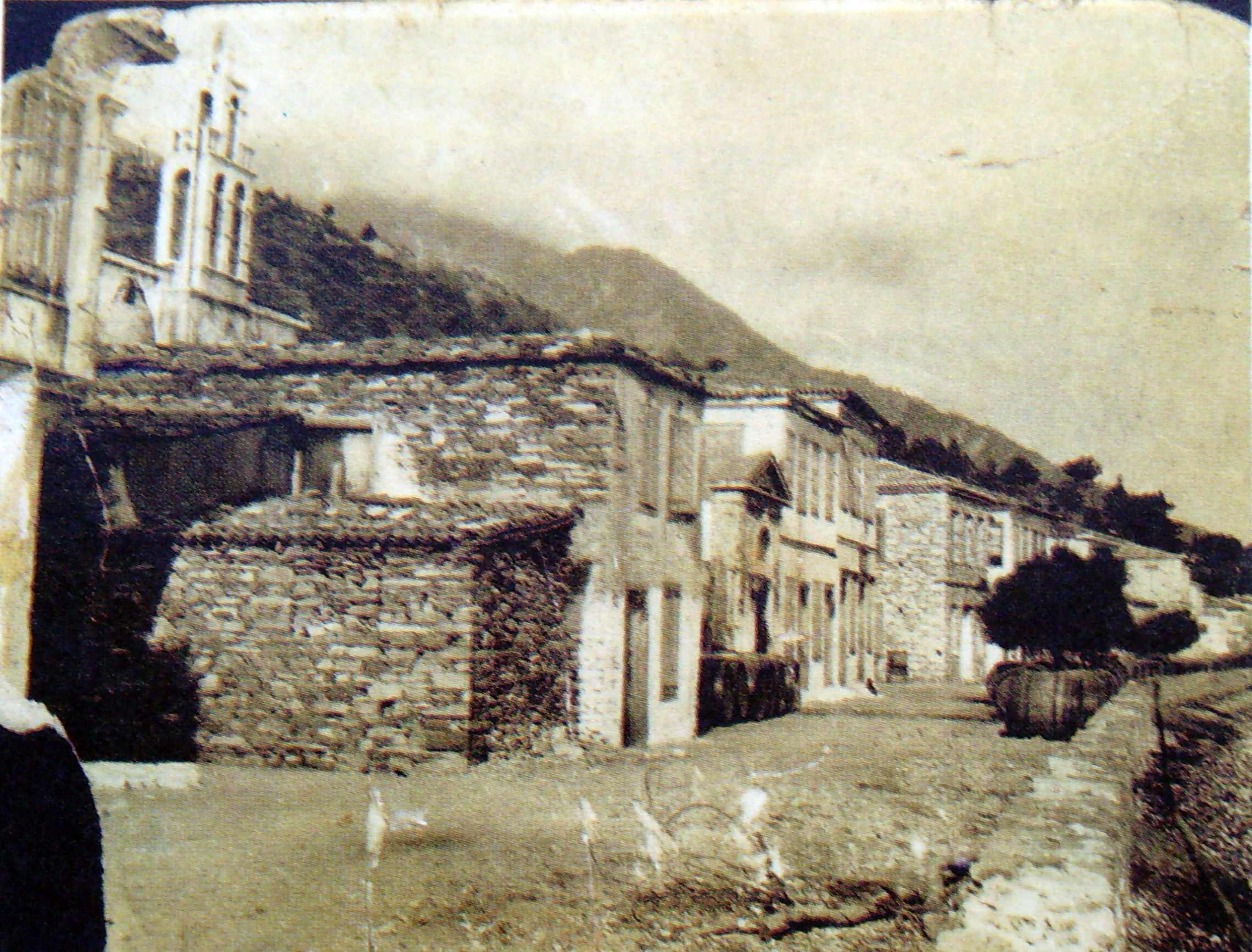 Mvskoke: Προπολεμική φωτογραφία του Αγίου Κωνσταντίνου όπου φαίνονται τα βαρέλια του κρασιού.